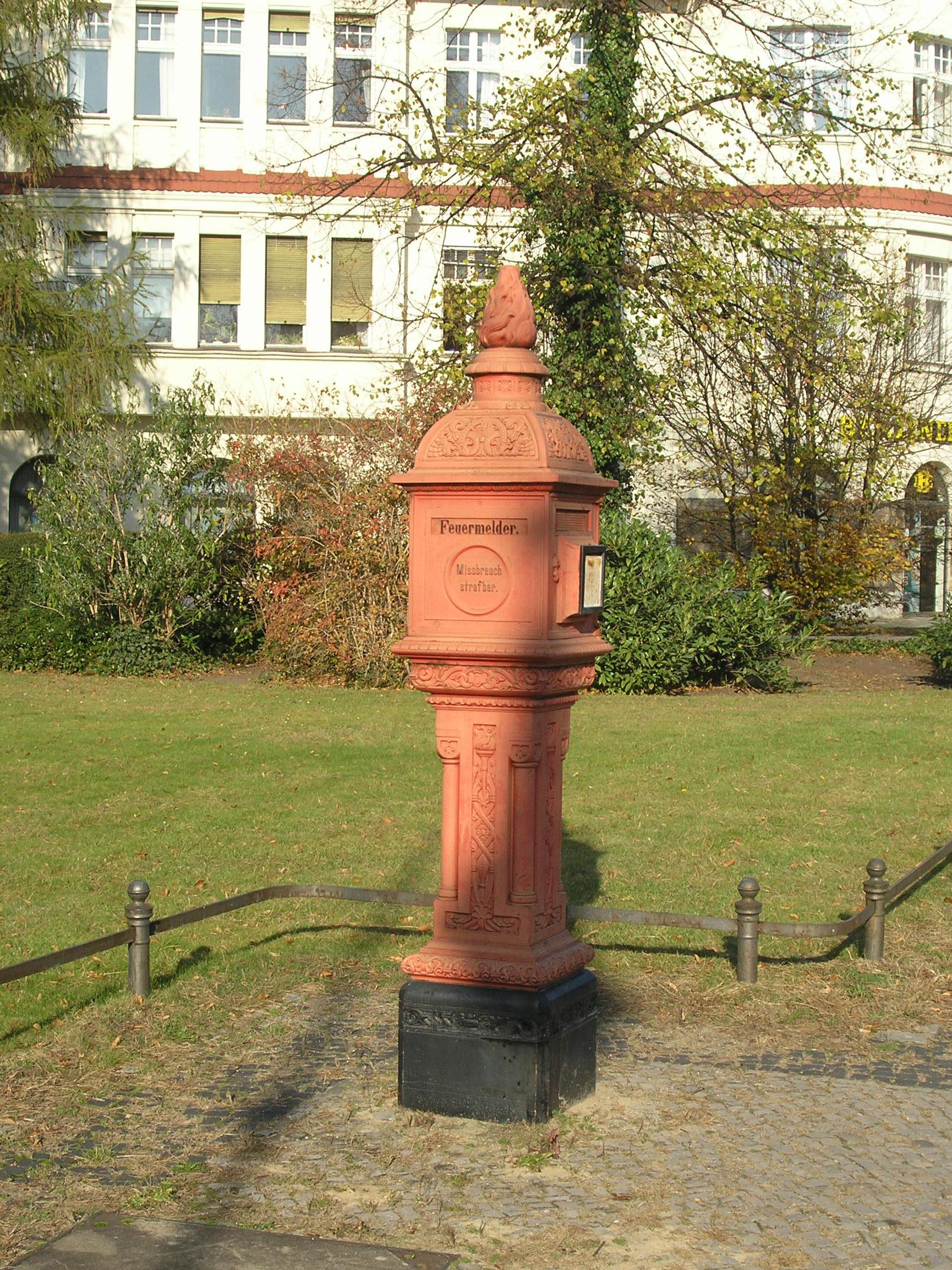 Historischer Brandmelder